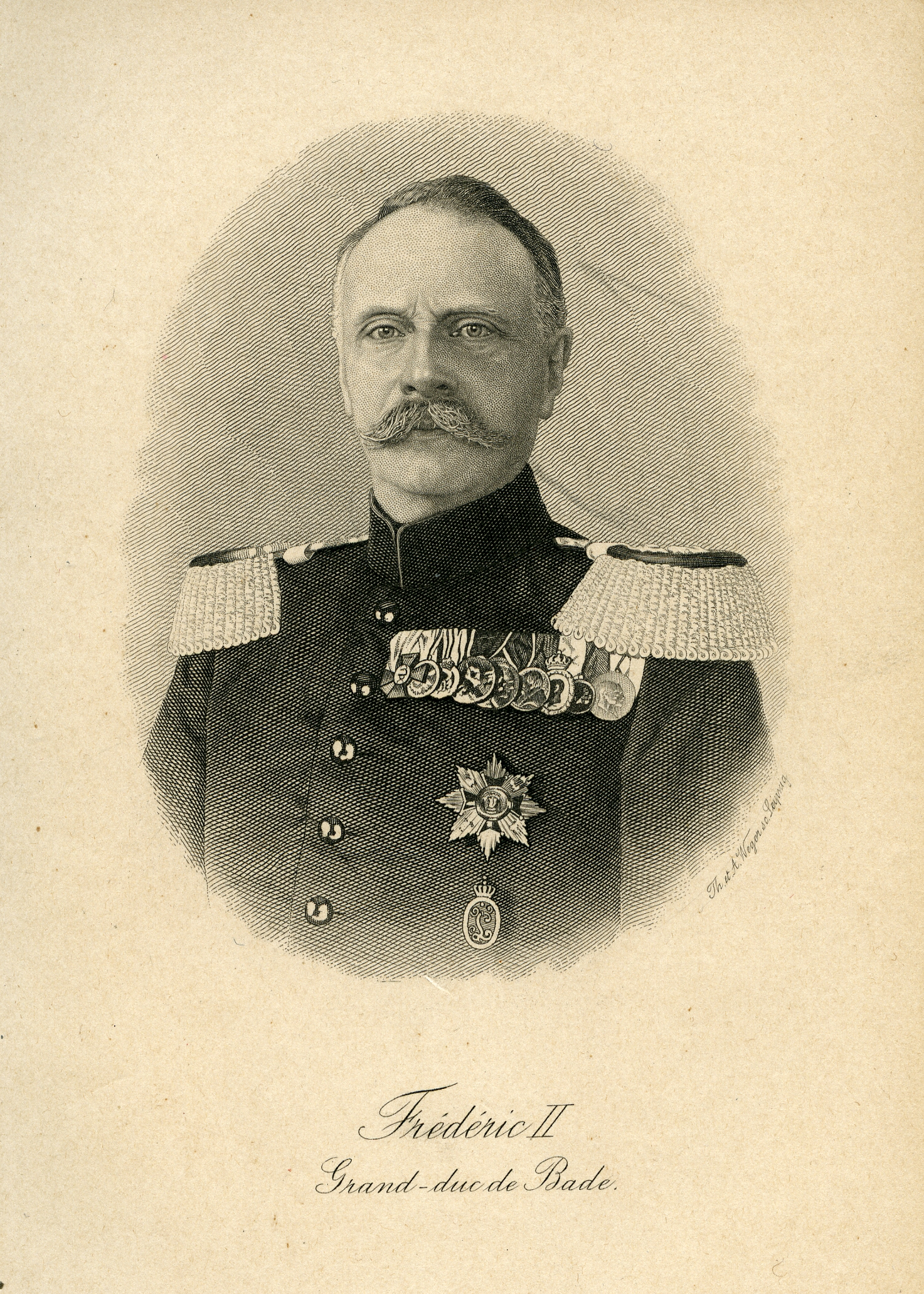 Frédéric II grand duc de Bade (1857-1928) Il doit avoir 51 ans sur cette photo de 1908-1909